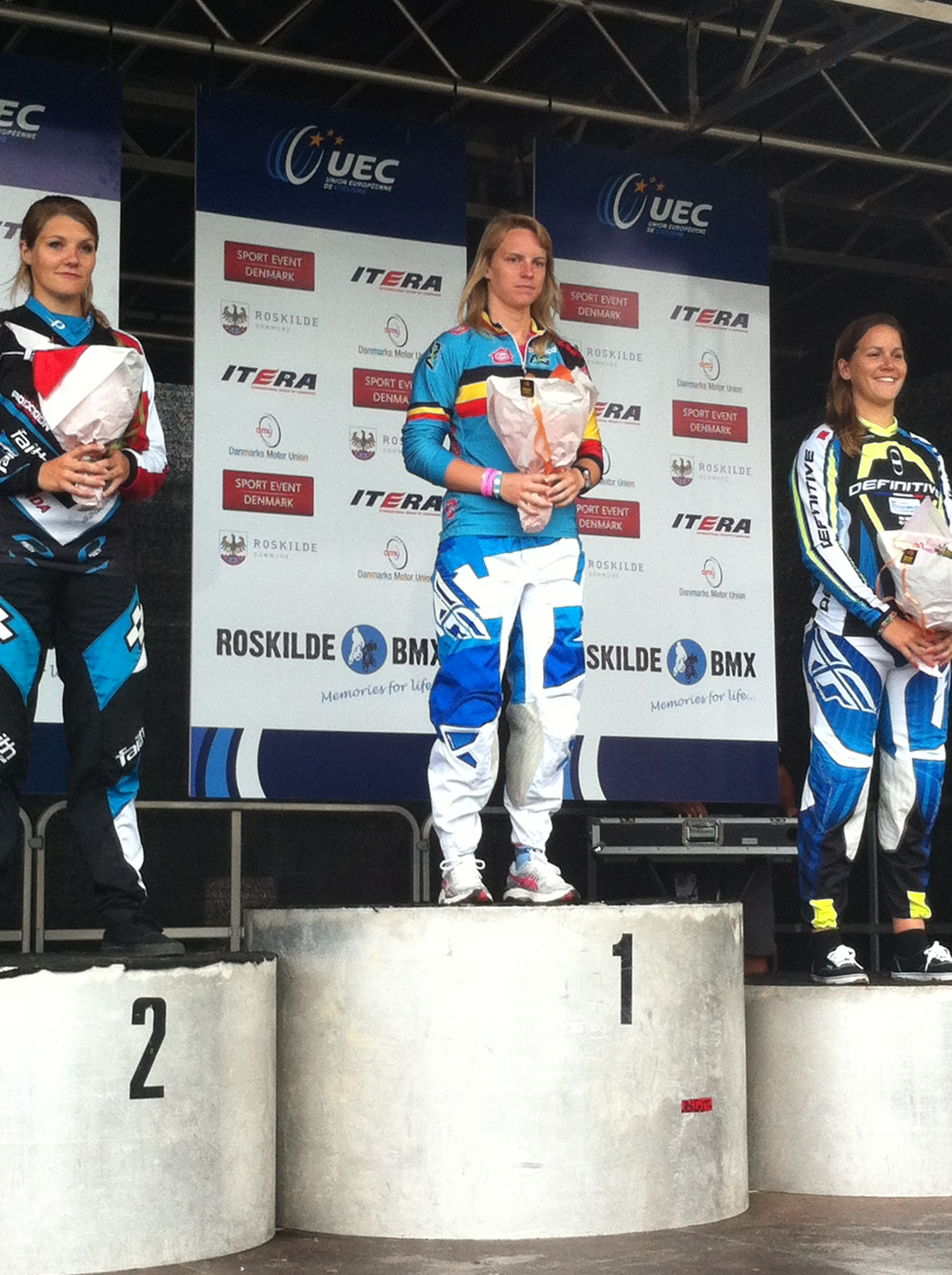 Podium eindstand European League